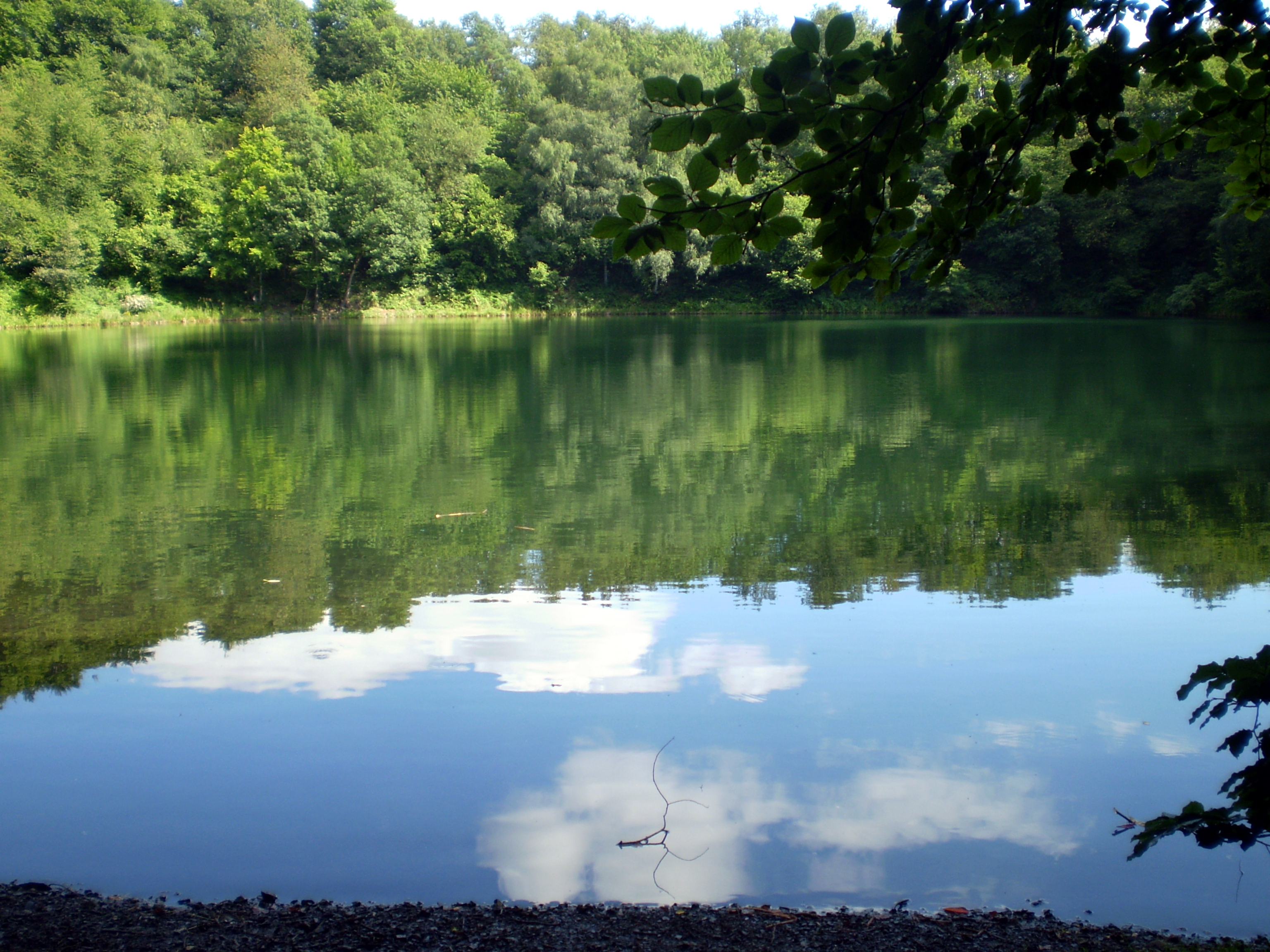 Der Himberger See, Abgrabungsgewässer des Himbergs, Aegidienberg